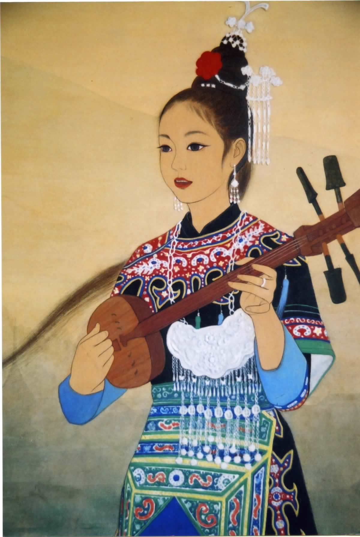 日本画「トン族琵琶歌」（P25号部分）後藤仁 2009年制作 japanese painting, goto jin